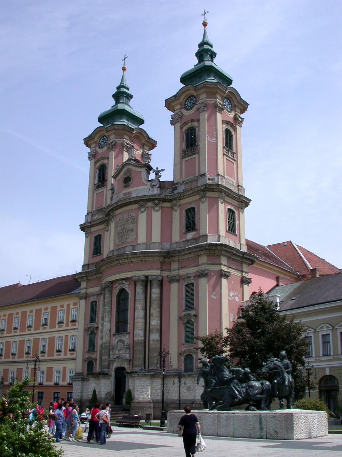 Minorite Church in Eger/Hungary